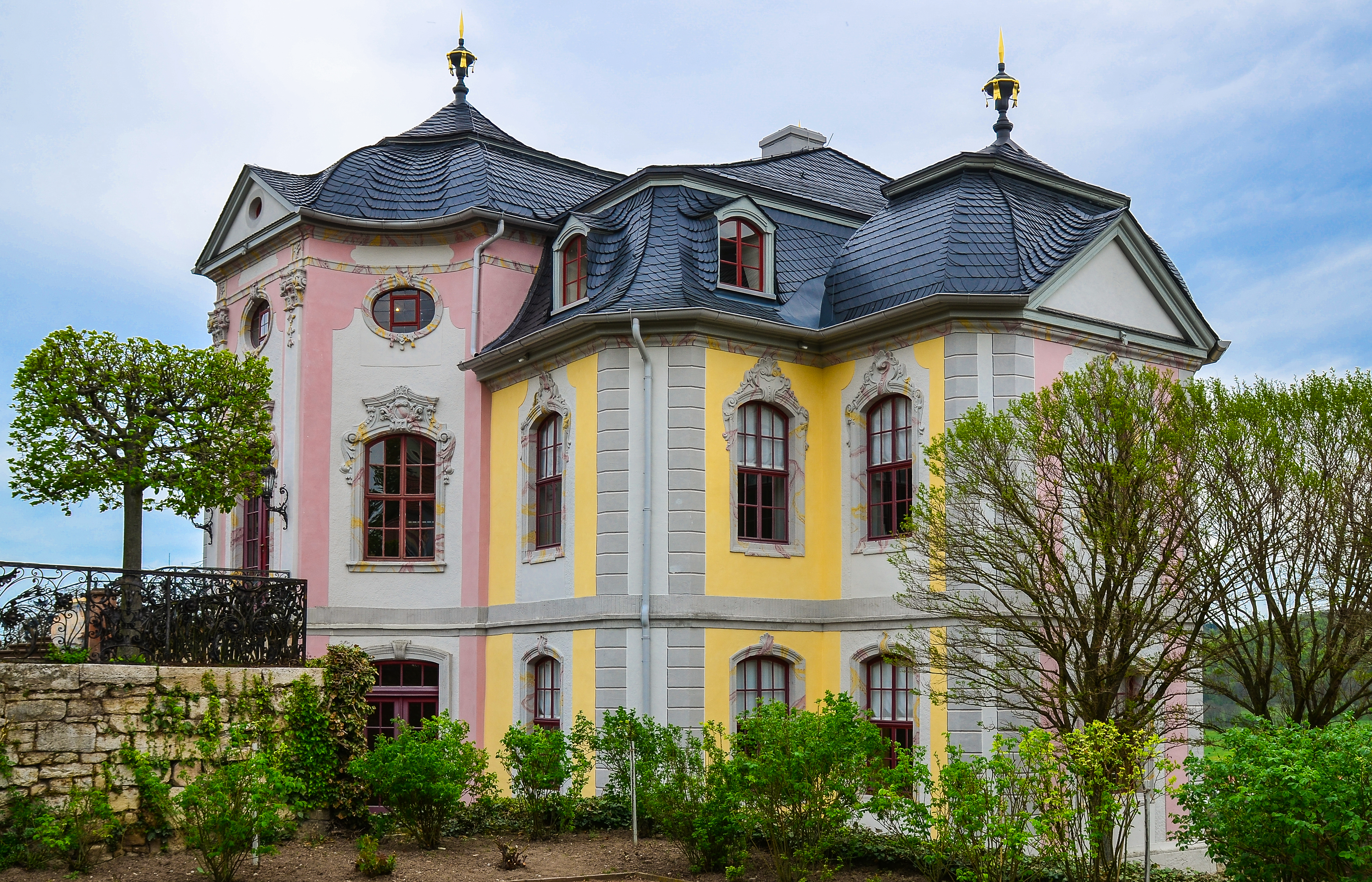 Rokokoschloss Dornburg, vom Park aus gesehen